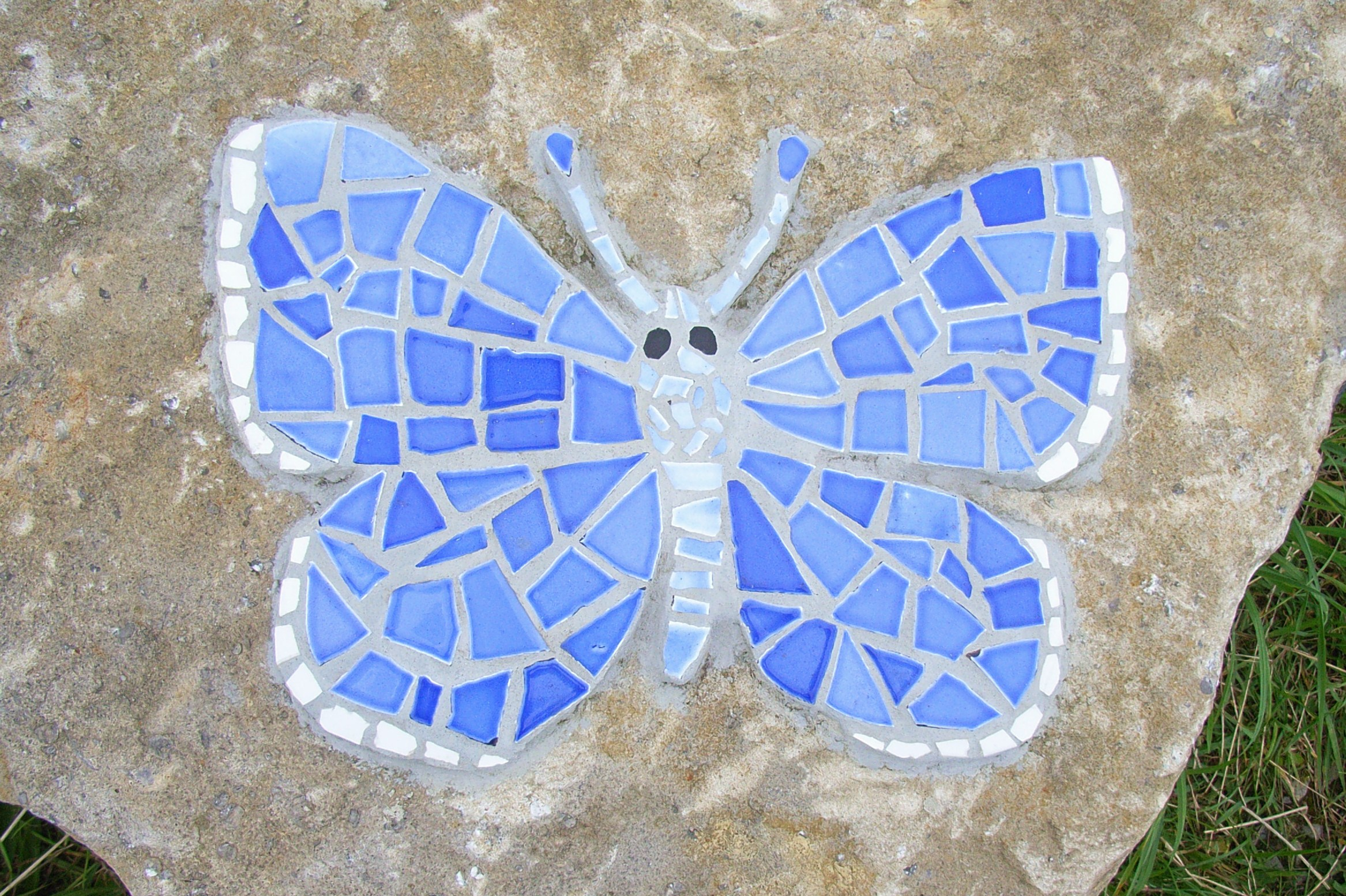 Bläuling - Mosaik als Symbol des Schmetterlingspfades auf den Kalktriften in Willebadessen